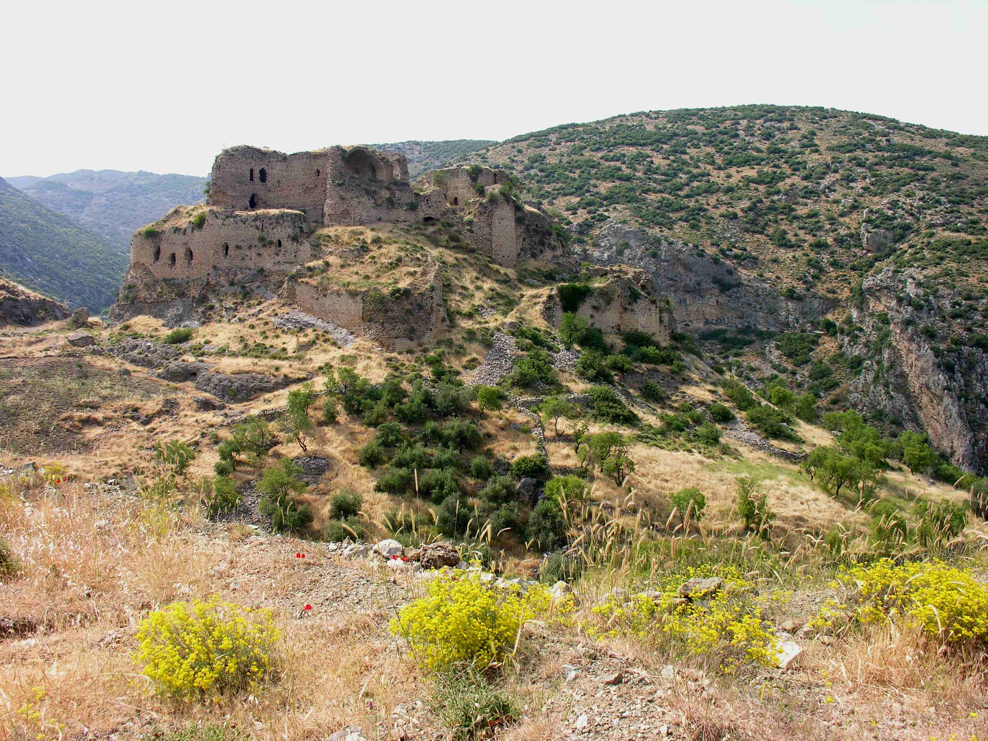 Baghras - burcht van o.a. de Tempeliers, in Amanosgebergte bij Antakya, Turkije. Foto genomen door Godfried Warreyn in mei 2006